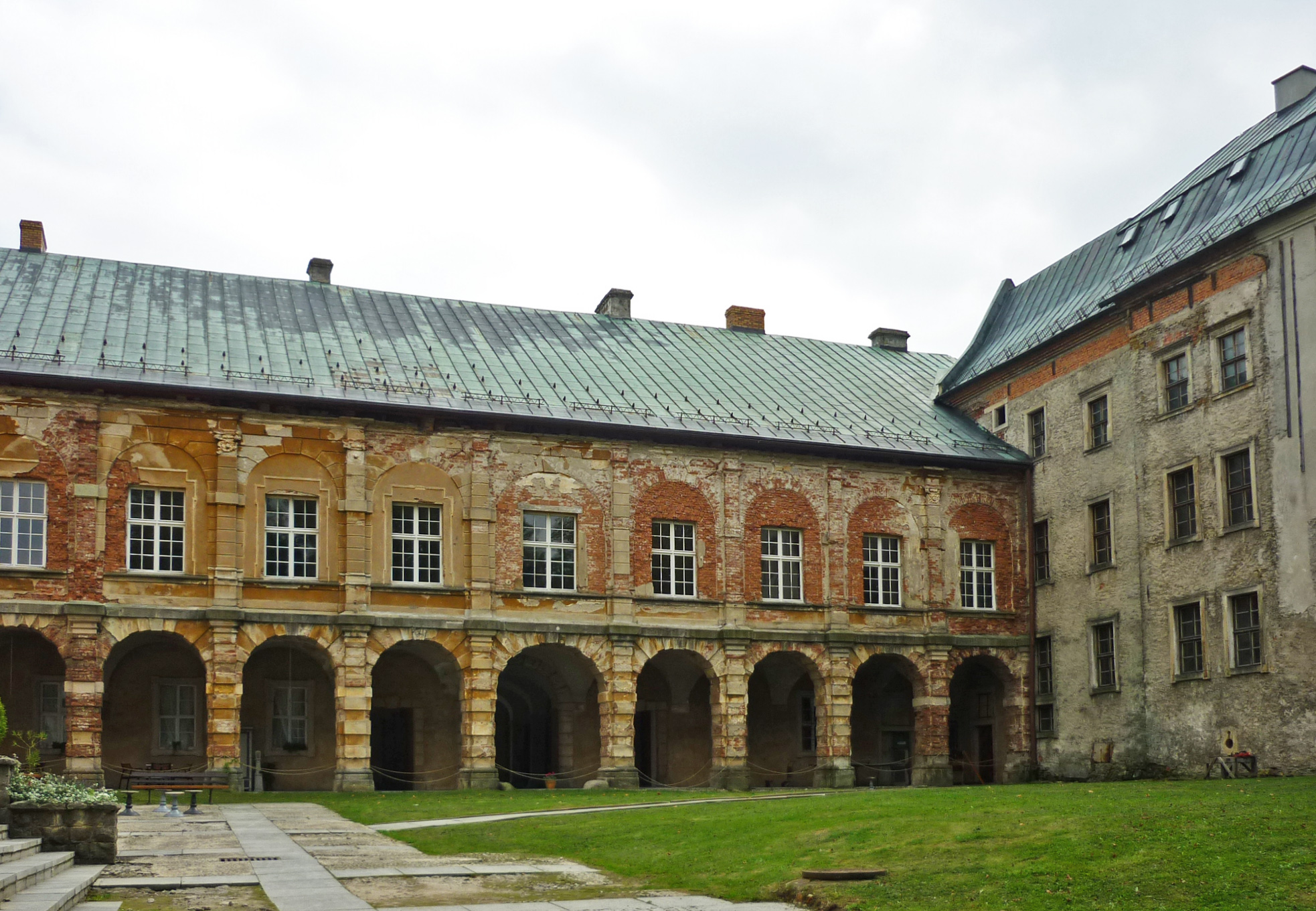 Międzylesie - dzedziniec zamku